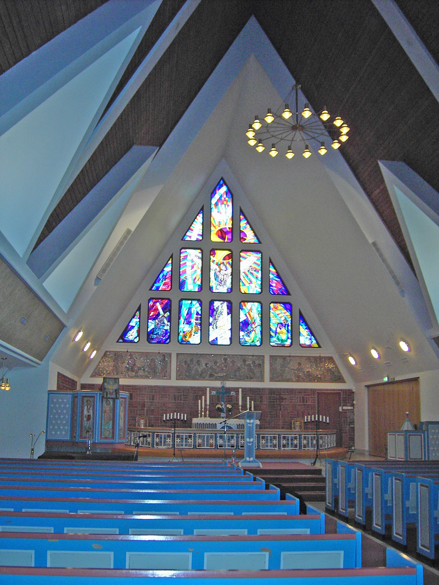 Sujet:Lutheresch Kierch zu Hammerfest Source:Eege Foto vum Benutzer:Perlblau